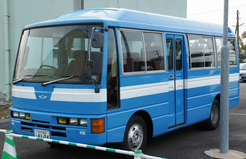 築城基地で撮影